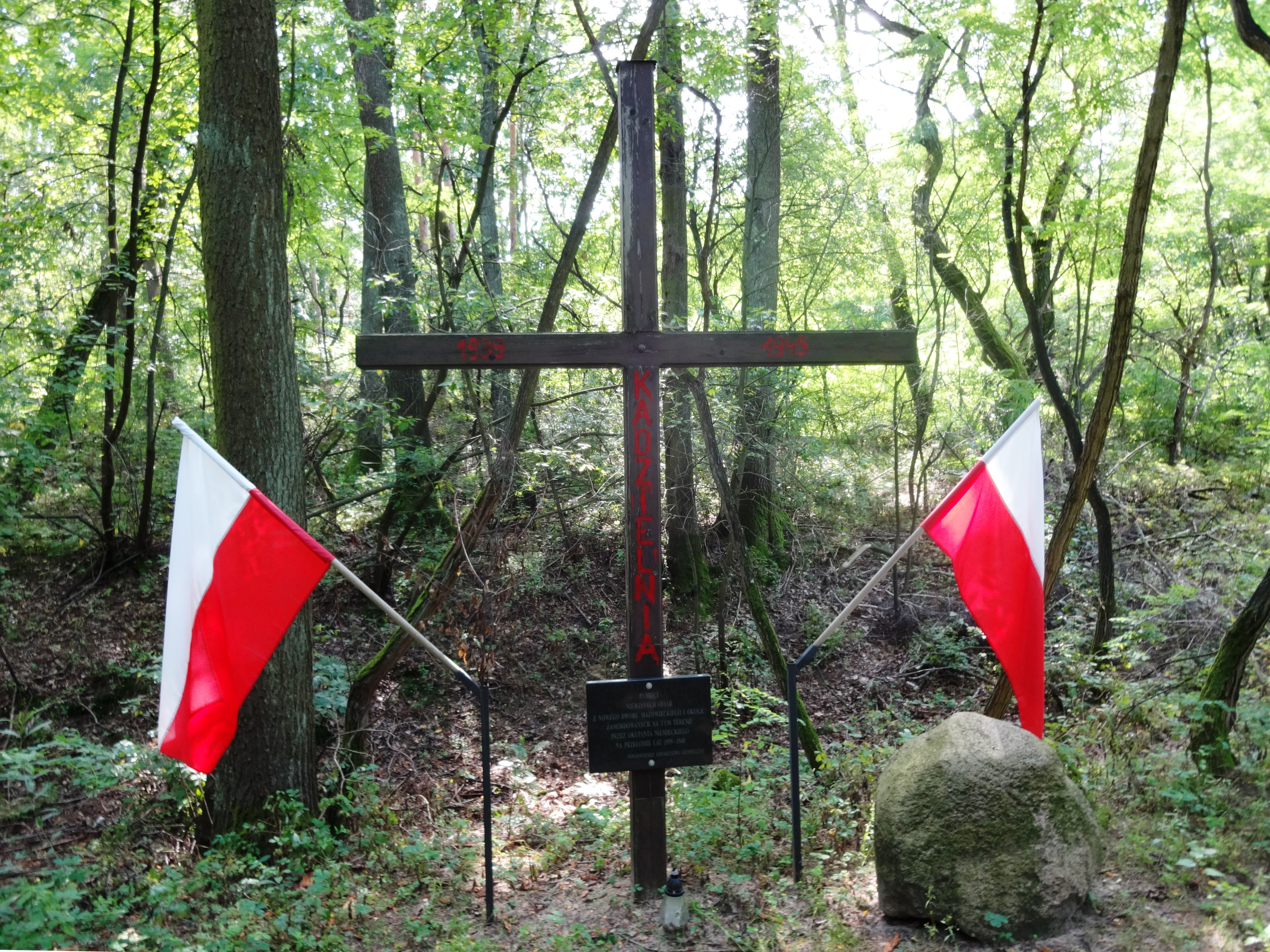 Krzyż poświęcony pamięci ofiar mordów niemieckich na przełomie 1939 i 1940 w uroczysku Kadzielnia na terenie wsi Trzciany